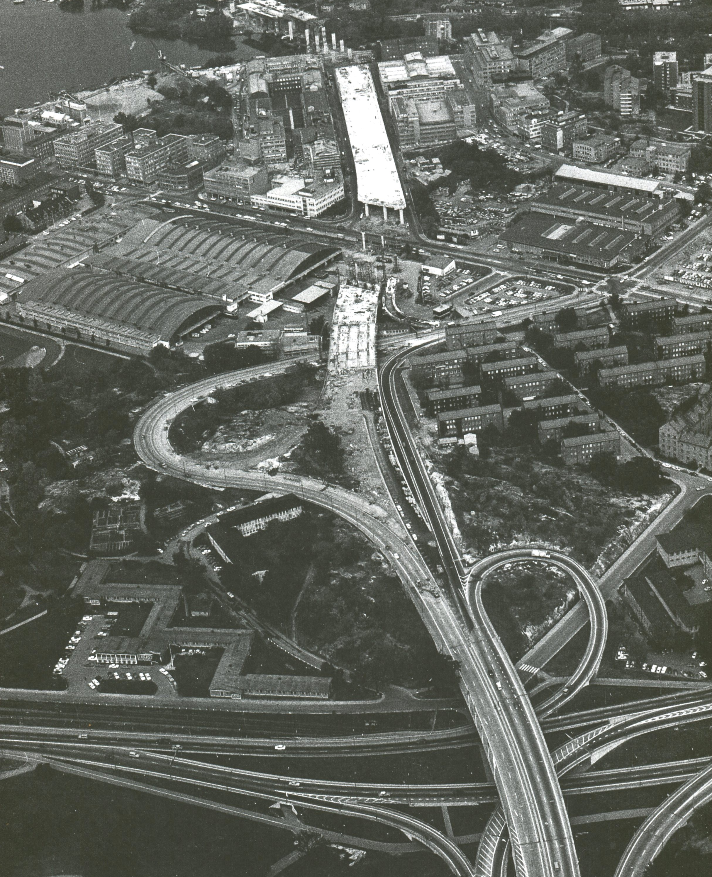 Essingeleden byggs genom Kristineberg i Stockholm med trafikplatsen Kristinebergsmotet.